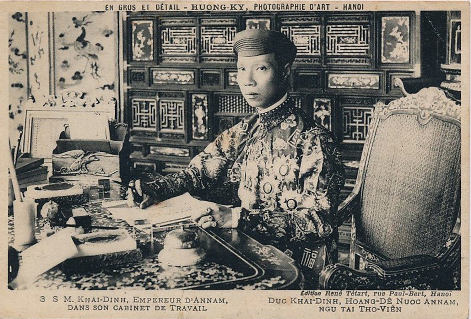 Emperor Khai Dinh Jan 1916